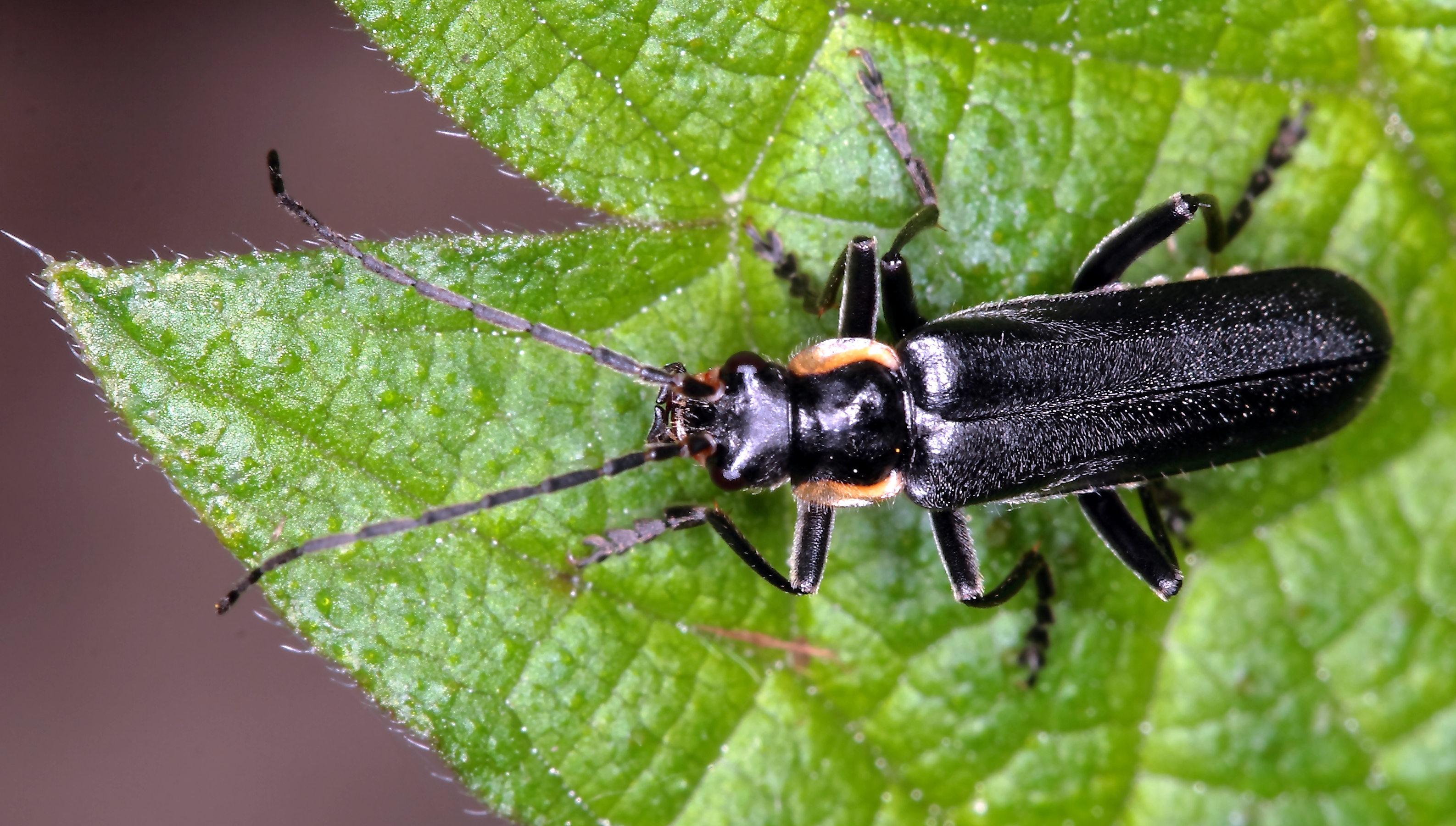 Dunkler Fliegenkäfer, Laubwald, Sachsen